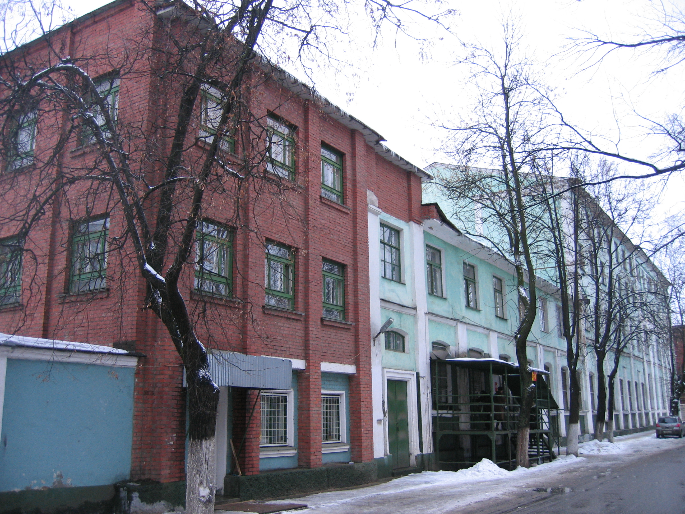 Brotfabrik in Orechowo-Sujewo, Russland